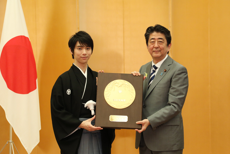 平成３０年７月２日、安倍総理は、総理大臣官邸で羽生結弦（はにゅうゆづる）氏に対する国民栄誉賞の表彰式を行い、表彰状及び盾を授与しました。